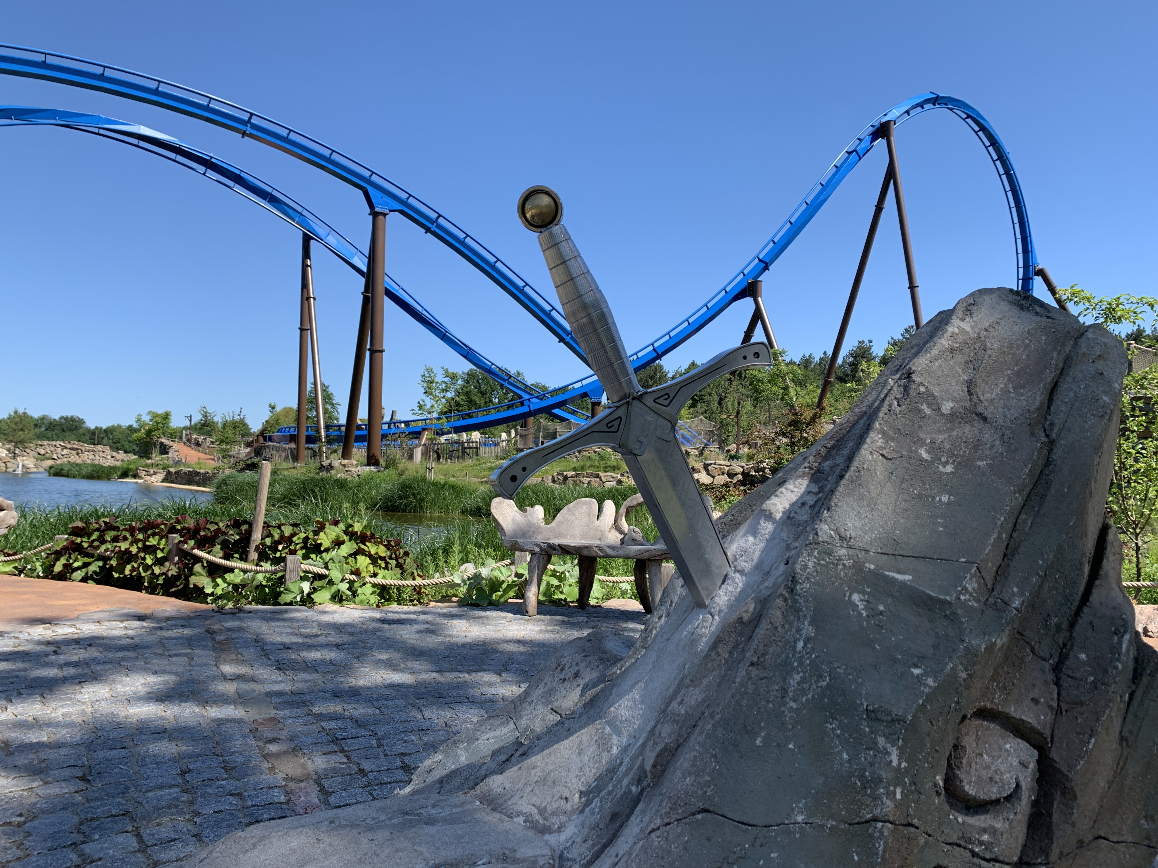 Nachbildung von "Excalibur" als Teil der Thematisierung